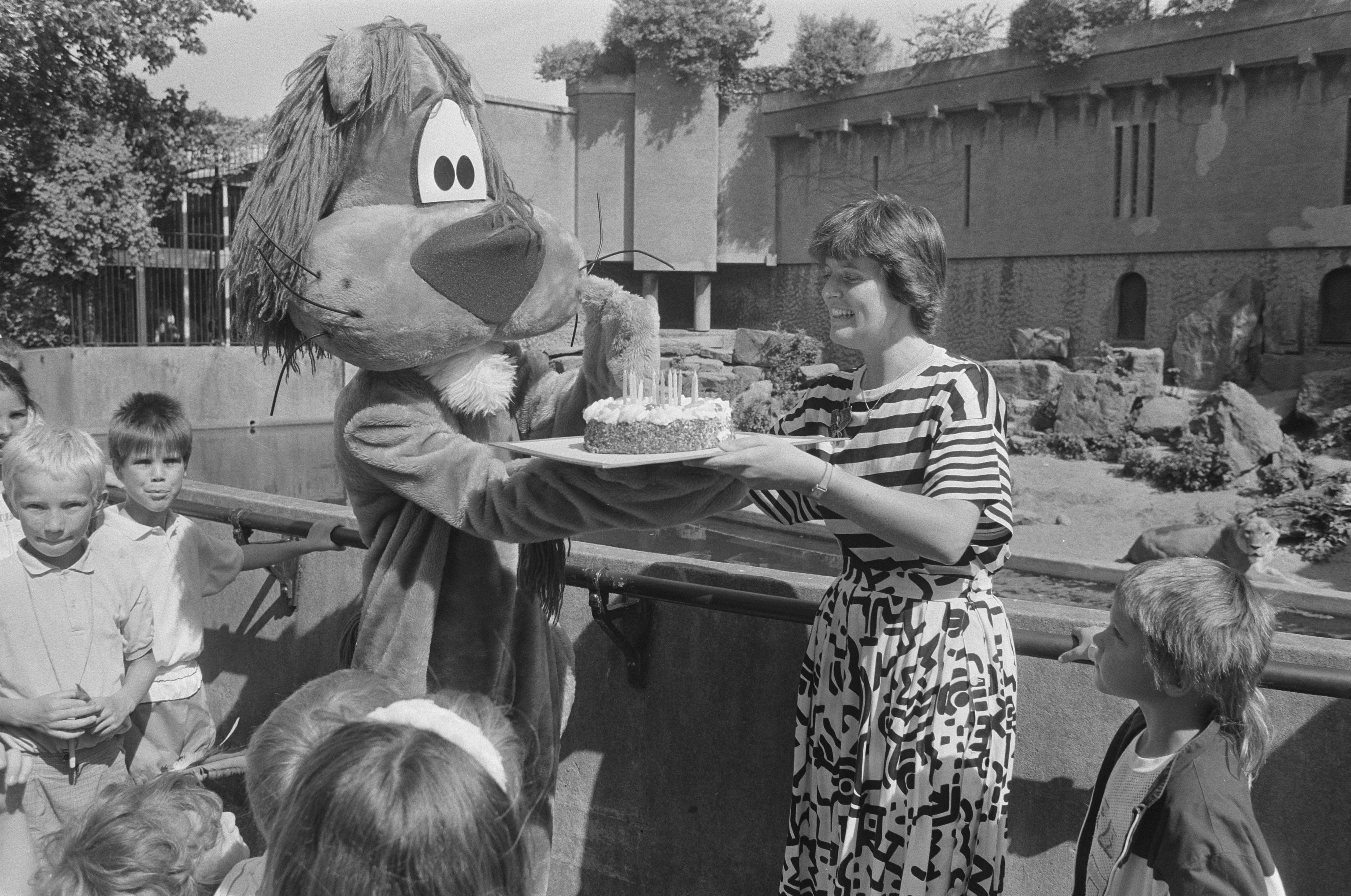 Collectie / Archief : Fotocollectie Anefo Reportage / Serie : [ onbekend ] Beschrijving : Loeki de Leeuw van tv-sterreclame (15 jaar) opent tentoonstelling in Artis; Louise Geesink overhandigt verjaardagstaart Datum : 14 juli 1987 Locatie : Amsterdam, Noord-Holland Trefwoorden : openingen, tentoonstellingen Persoonsnaam : Geesink, Louise, Loeki de Leeuw Instellingsnaam : Artis Fotograaf : Molendijk, Bart / Anefo Auteursrechthebbende : Nationaal Archief Materiaalsoort : Negatief (zwart/wit) Nummer archiefinventaris : bekijk toegang 2.24.01.05 Bestanddeelnummer : 934-0340